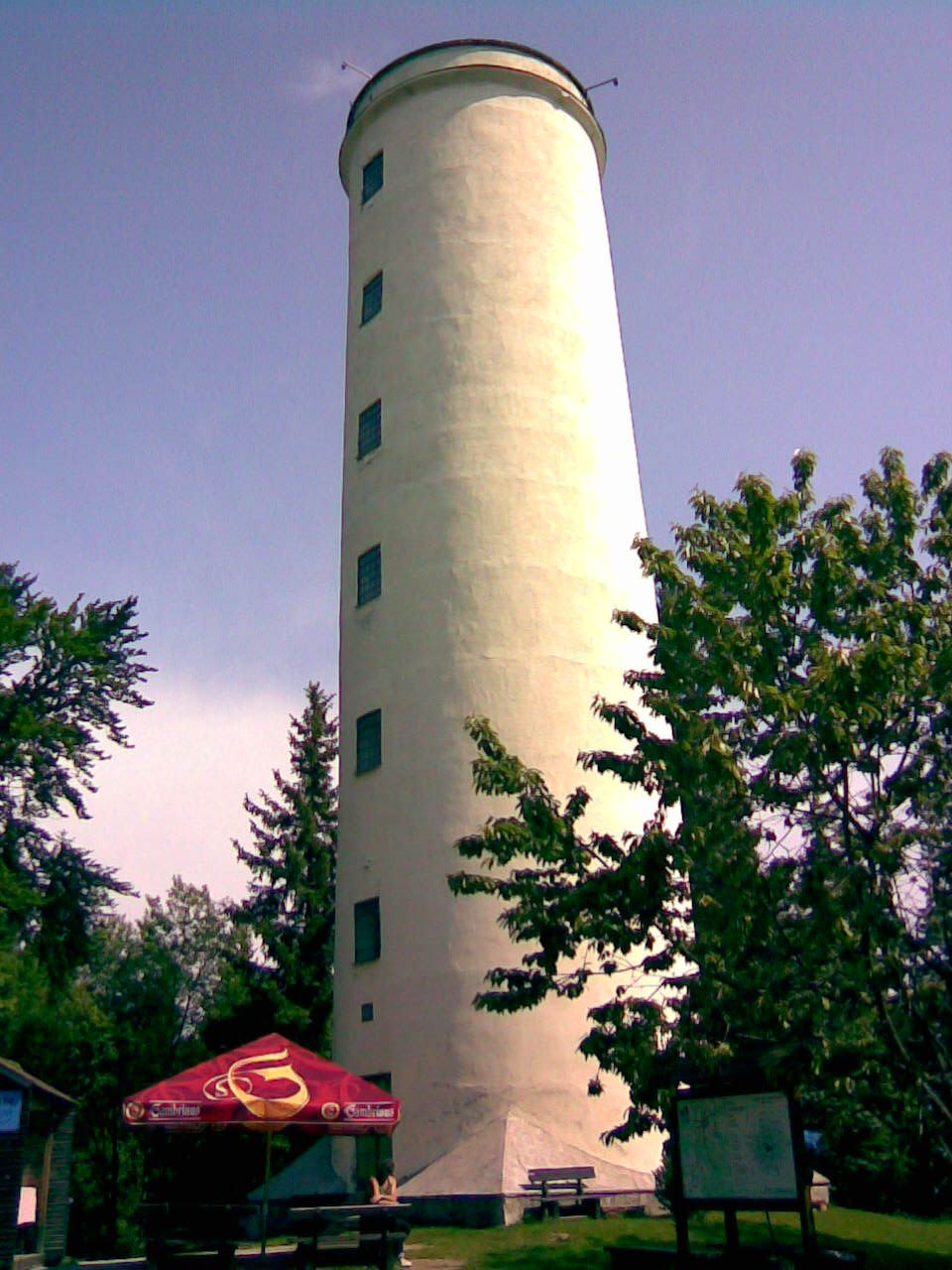 Rozhledna na Libíně